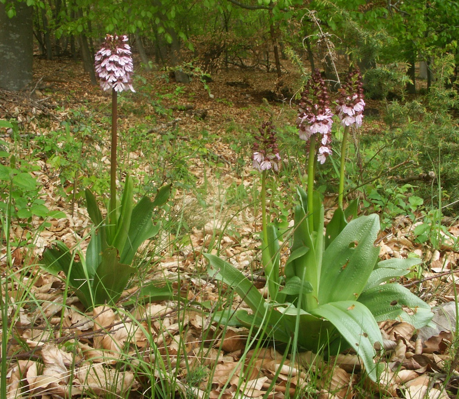 Orchis purpurea, Nördlinger Ries, Germany